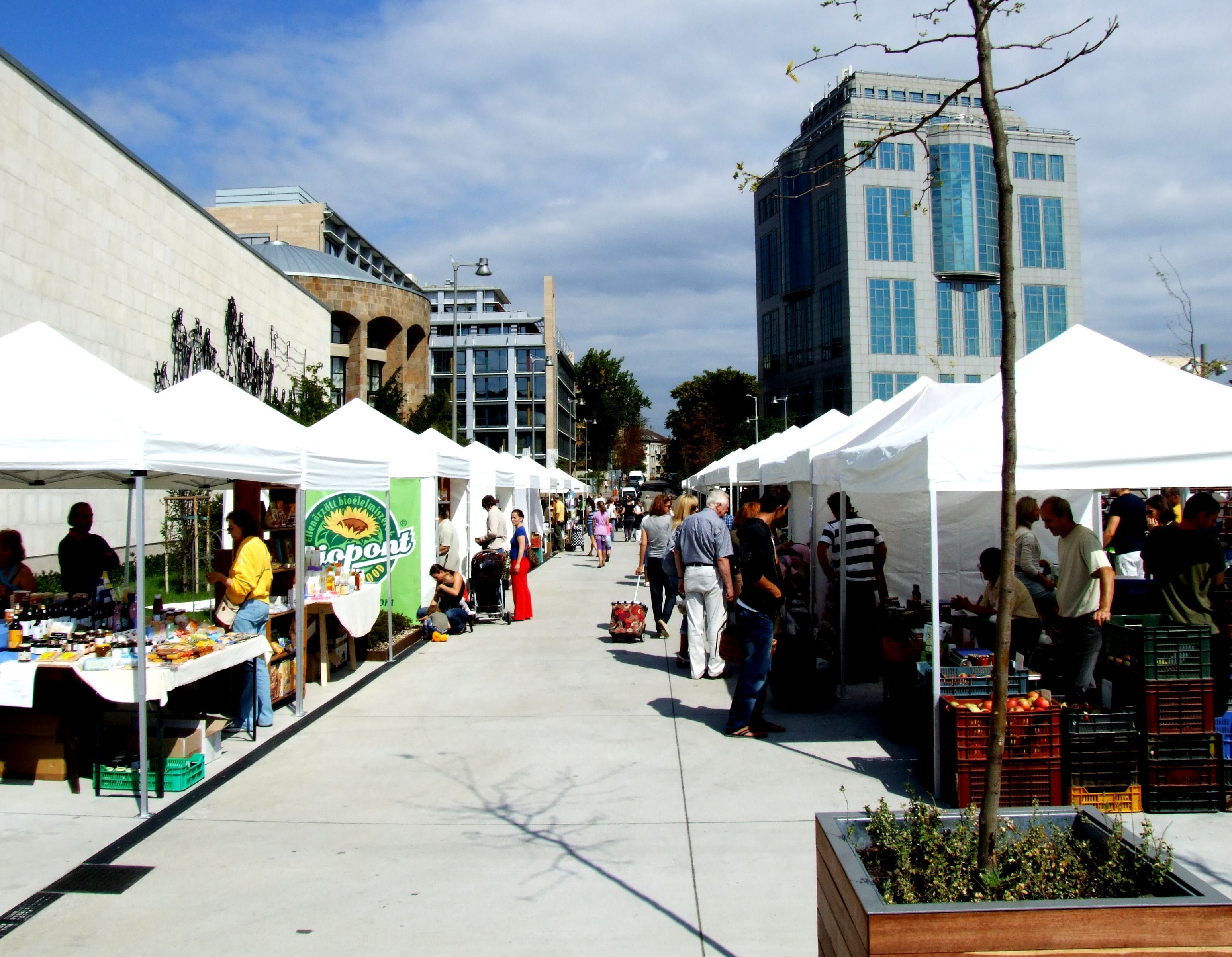 MOM Kulturális Központ rekonstrukció. Sirály utca, bio piac.